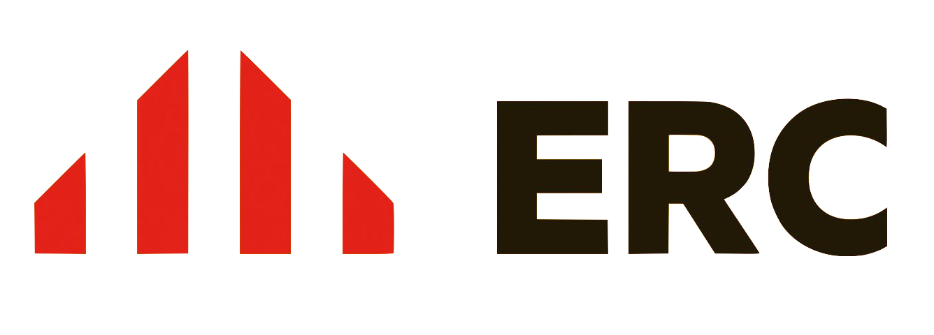 Nou logotip d'ERC (2013-actualitat)